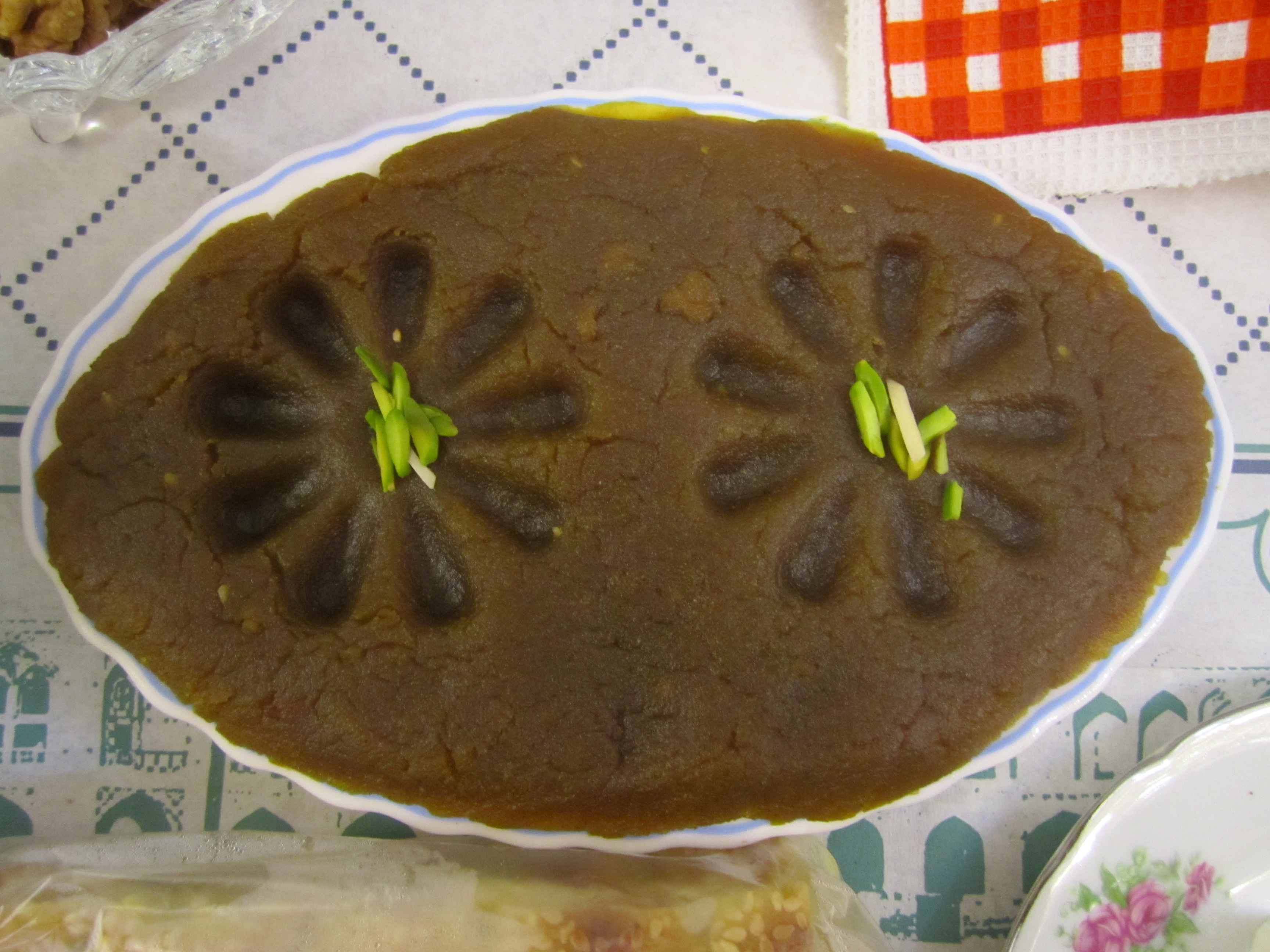 حلوای تازه